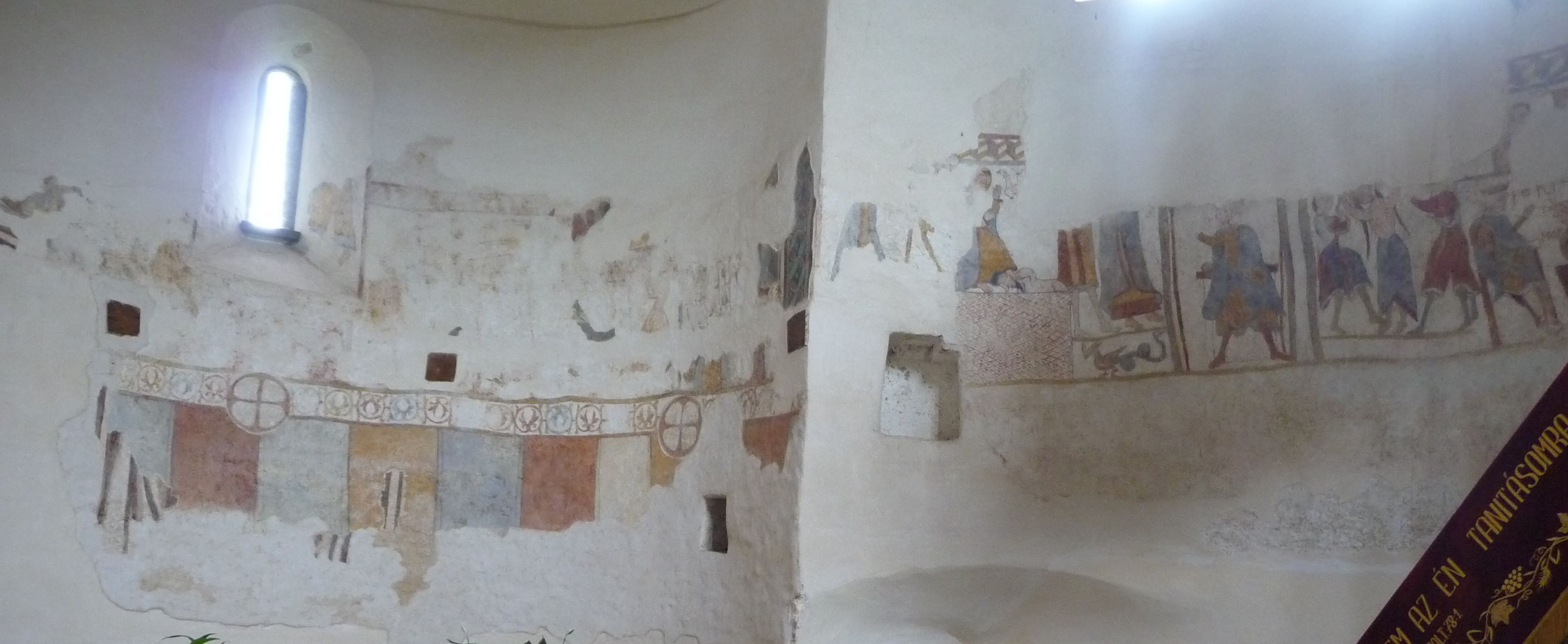 A szalonnai református templom falképei